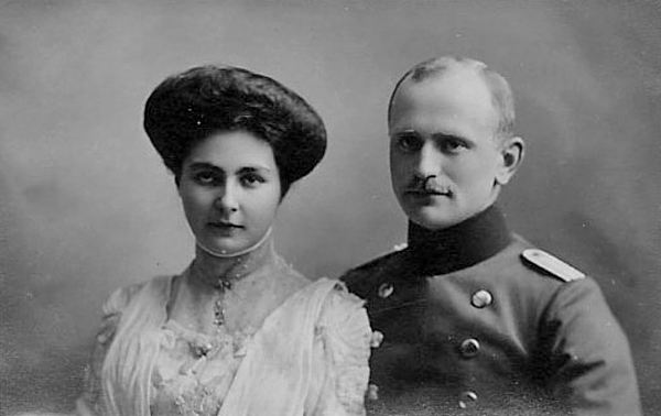 Ida von Reuss (* 1891; † 1977) und Fürst Christoph Martin zu Stolberg-Roßla (* 1888; † 1949) als Verlobte